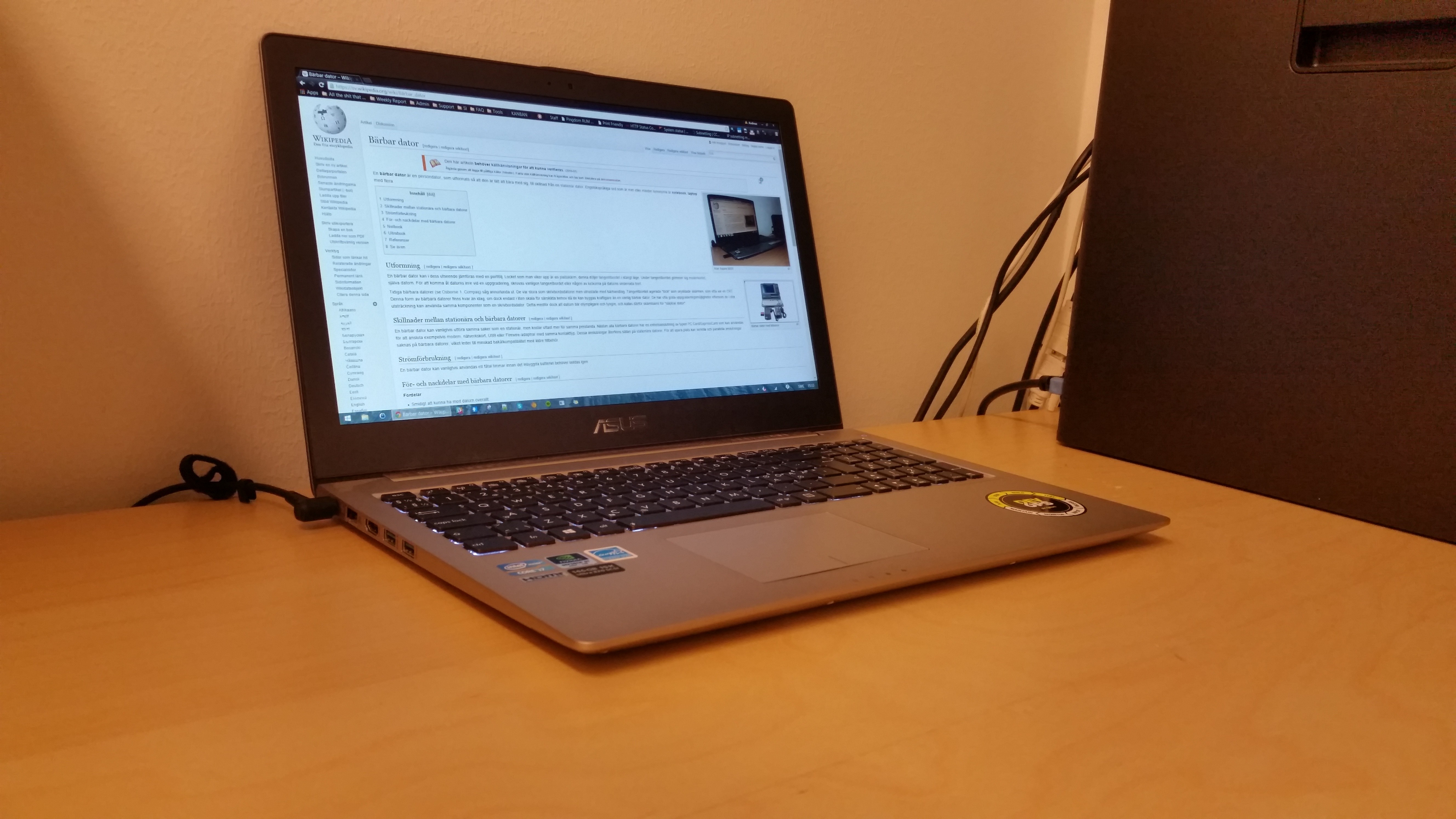 Laptop av märket Asus